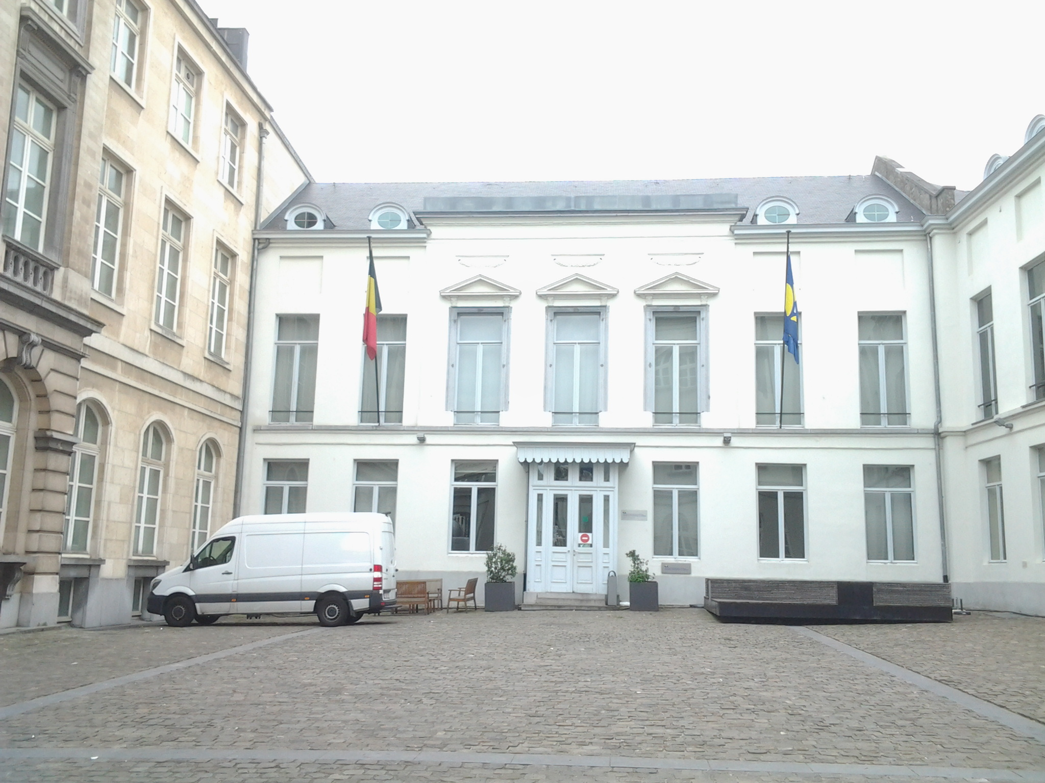 Annexe de l'Hôtel de Spangen Place Royale à Bruxelles